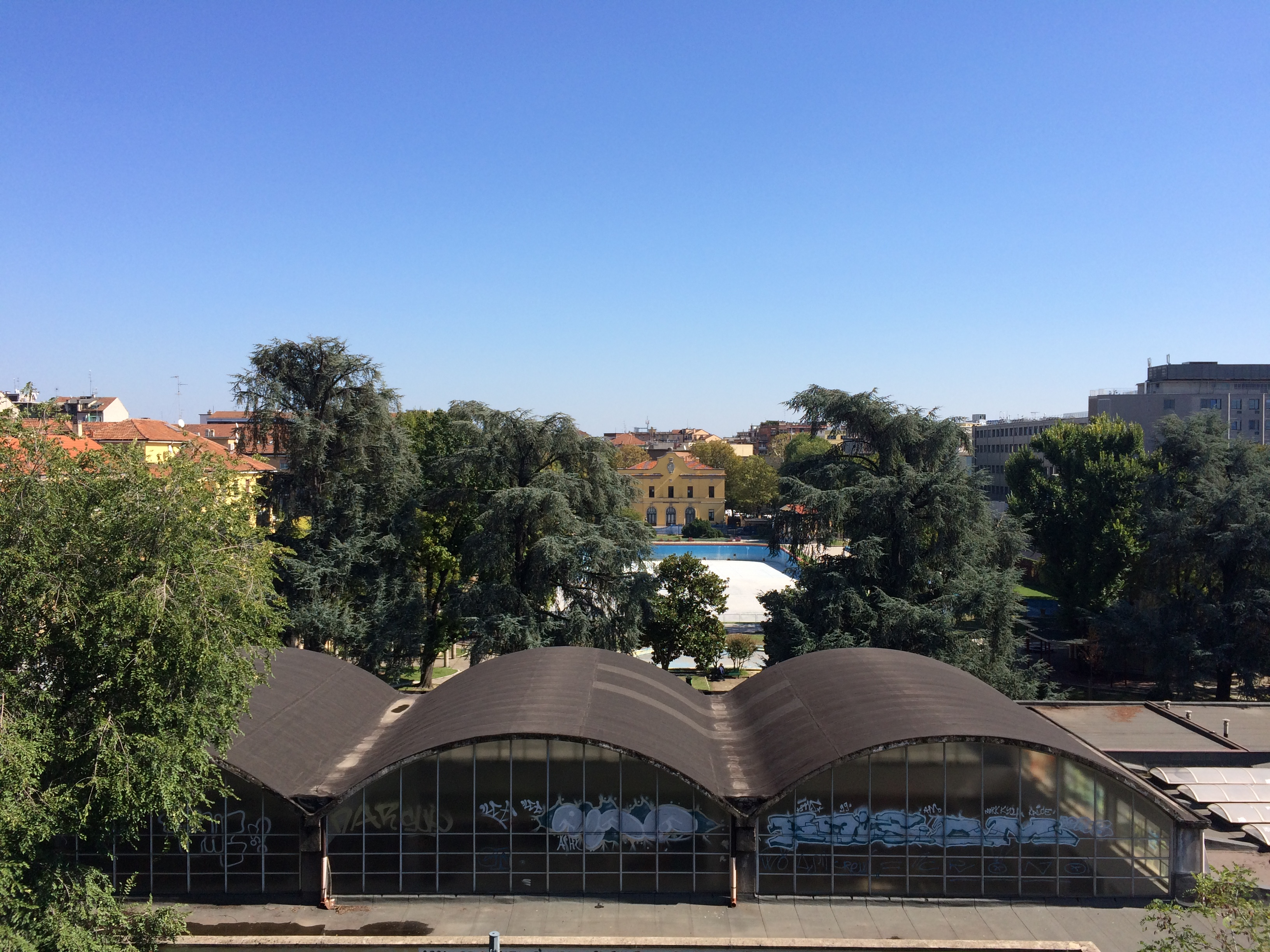 Piscina Guido Romano - View Via Ampere